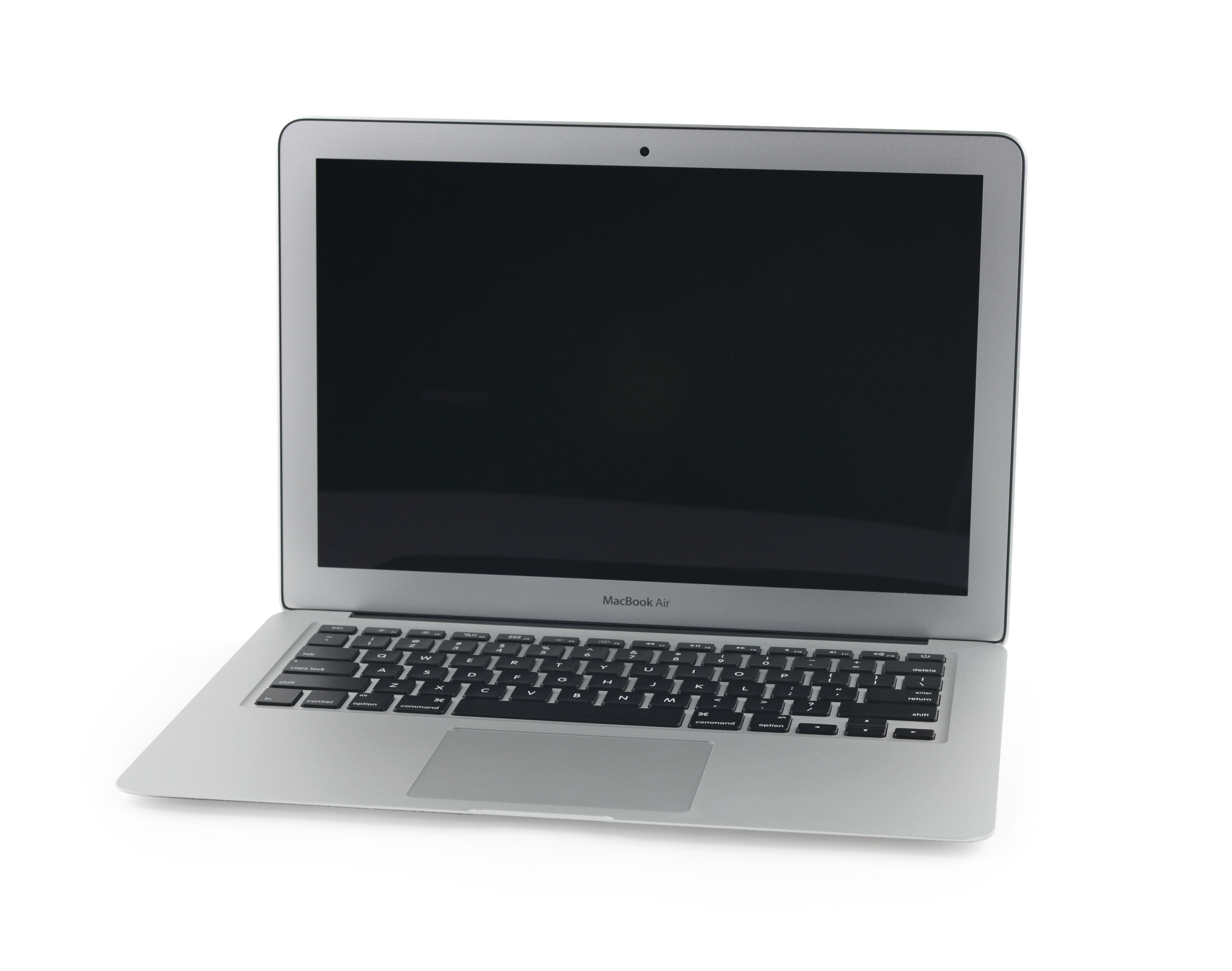 Macbook Air